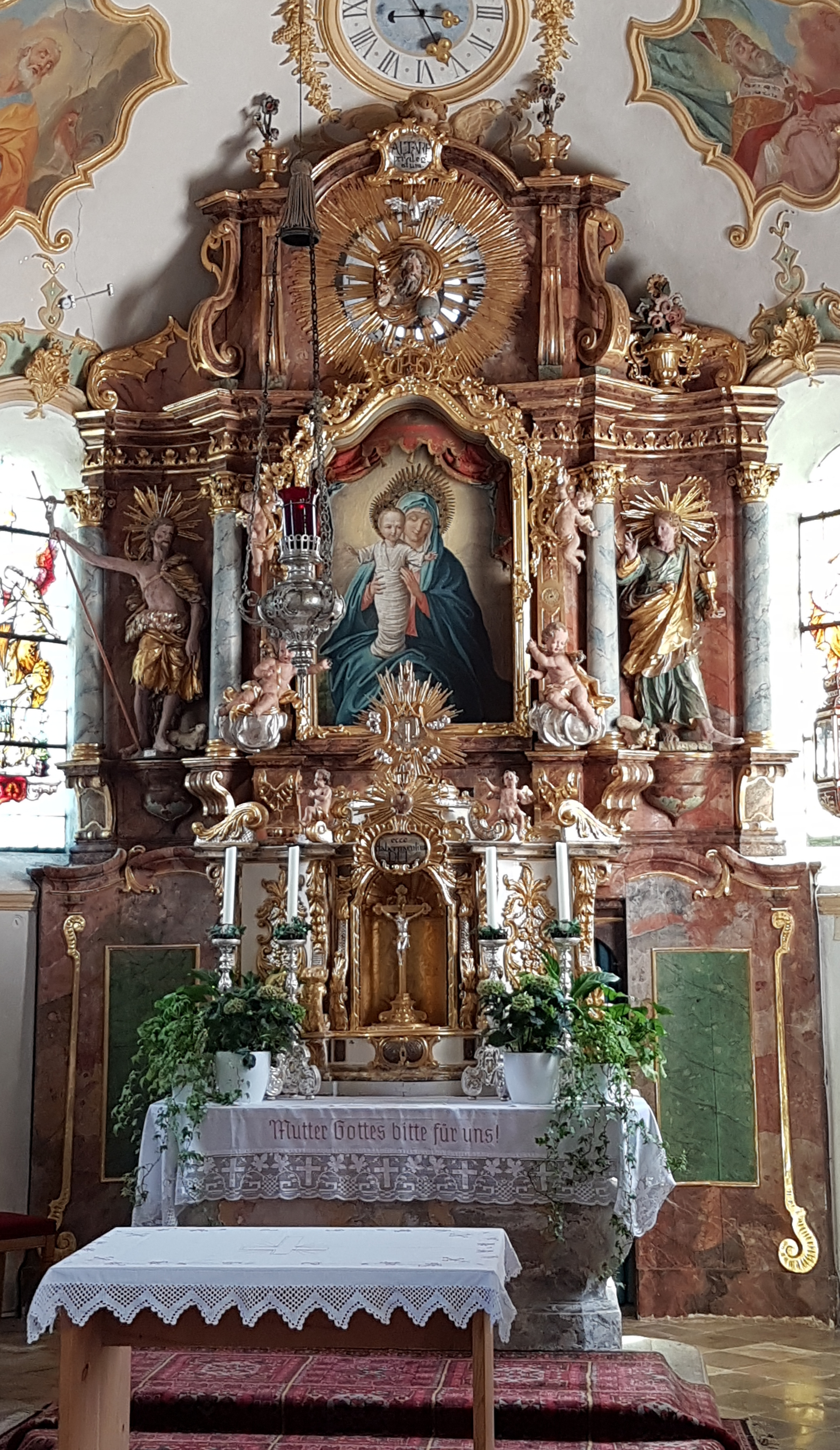 Maria Stern (Neukirchen am Simssee)